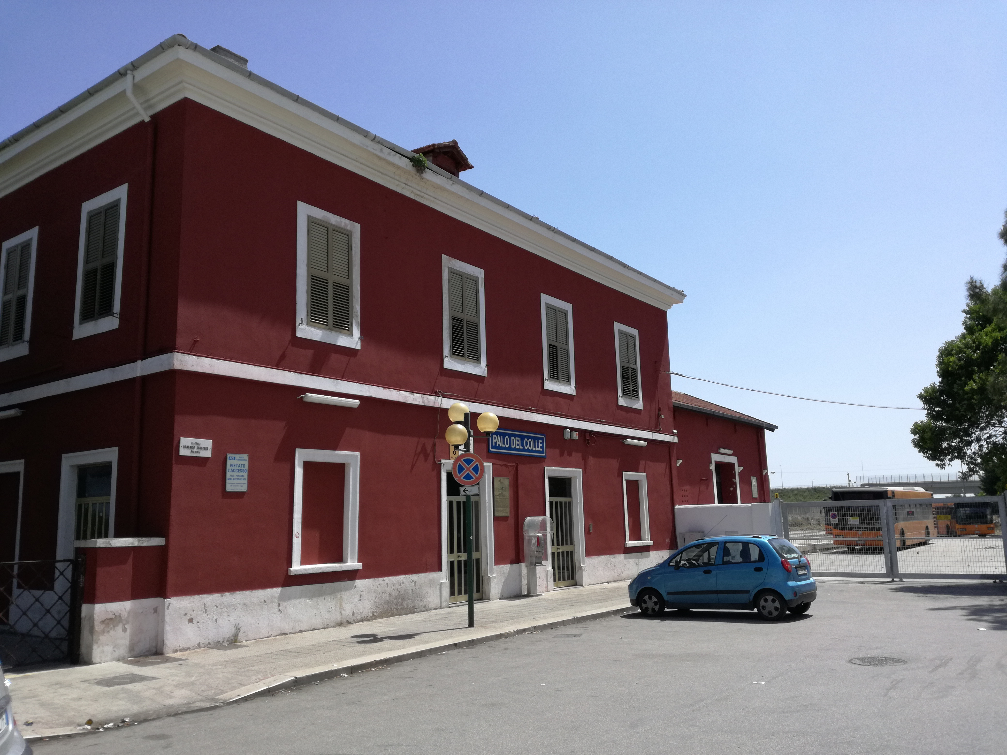 Stazione ferroviaria di Palo del Colle